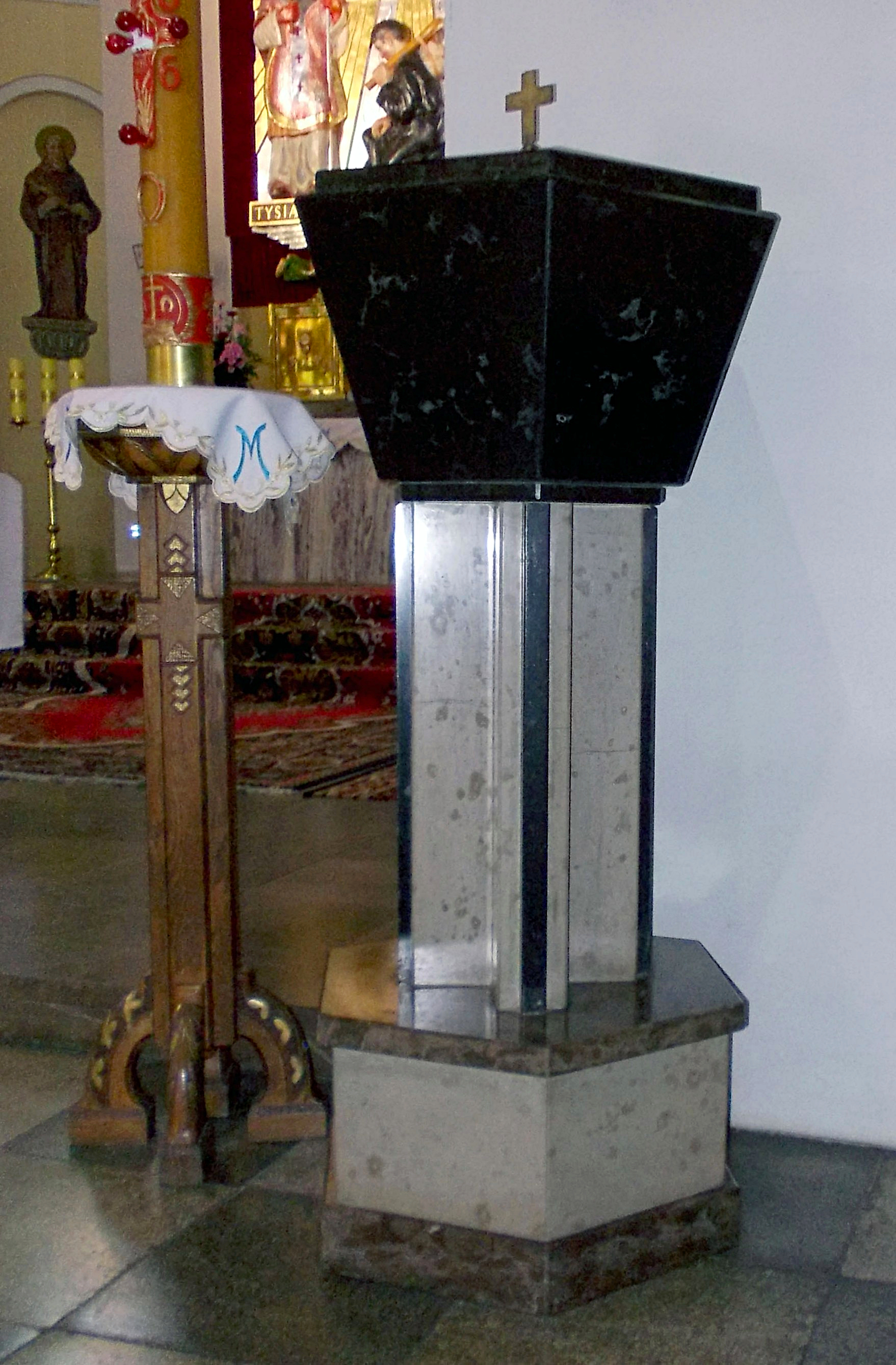 Marmurowa chrzcielnica w kościele Imienia Maryi w Bączalu Dolnym, wykonana w pracowni kamieniarskiej rodziny Dacylów z Jasła - Sobniowa.